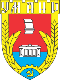 Герб Умані радянського періоду